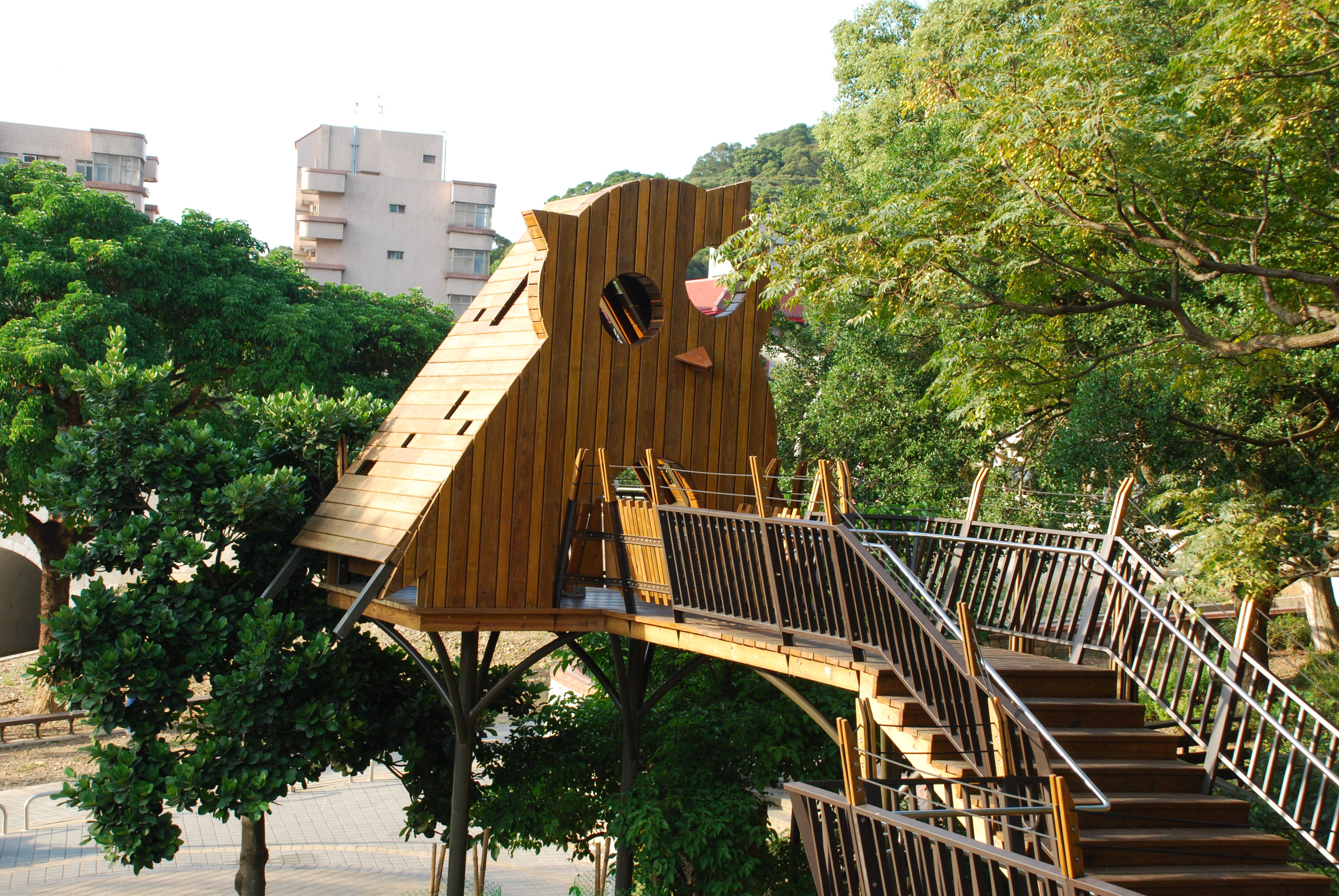 333, Taiwan, 桃園市龜山區龜山里